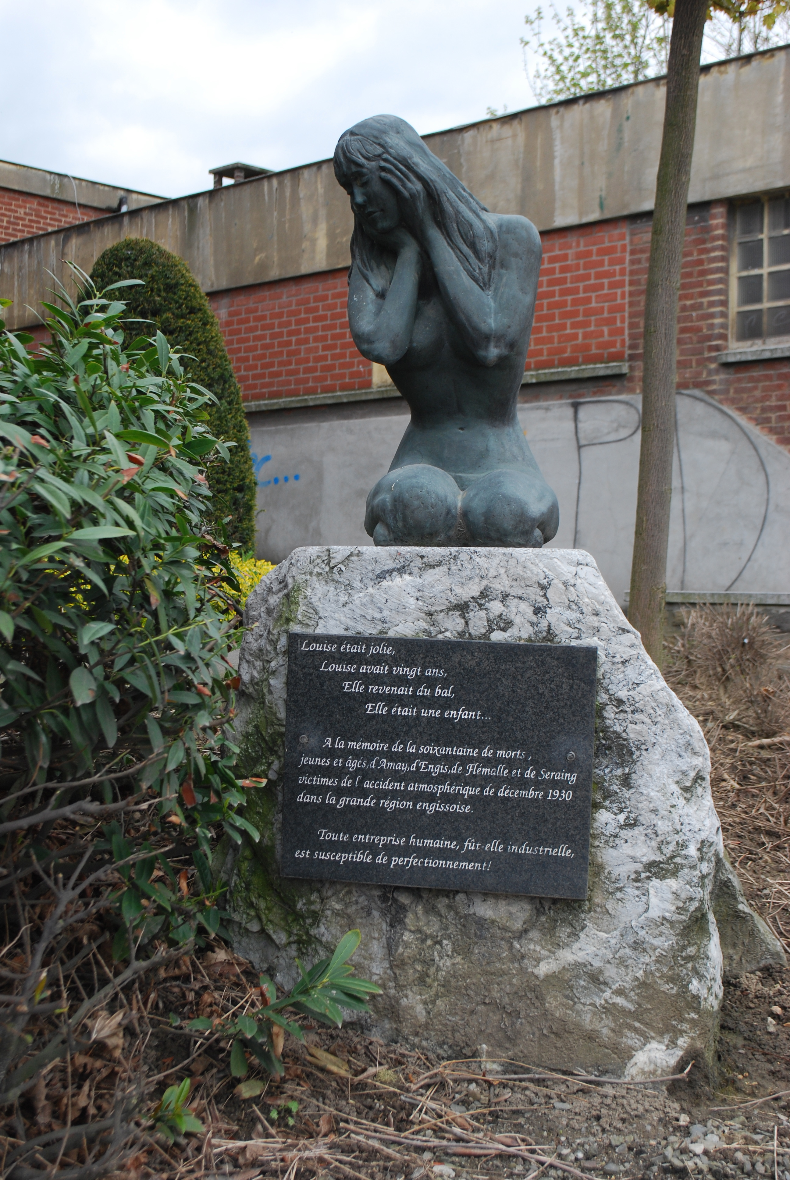 Vue de Engis, sur la rive gauche de la Meuse, dans la province de Liège (Belgique).